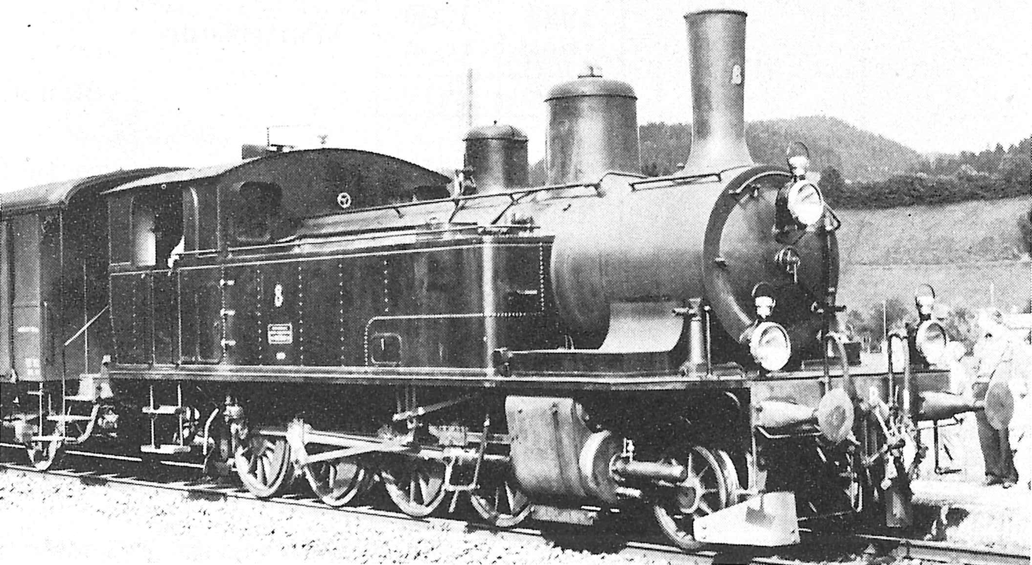 Ed 4/5 Nr. 8 der Emmentalbahn (EB) In den Jahren 1899 und 1914 beschaffte die Emmentalbahn drei Dampflokomotiven des Typs Ed 4/5 mit den Betriebsnummern 6 bis 8. Die Burgdorf-Thun-Bahn schloss sich der ersten Bestellung mit der Ed 4/5 Nummer 5 an. Solche Tenderloks für gemischten Dienst wurden in ähnlicher Bauart auch für andere Schweizer Privatbahnen gebaut. Die Lokomotiven 5 bis 7 waren ursprünglich Nassdampfmaschinen und arbeiteten nach dem nicht ganz einfachen Zweizylinder-Verbundsystem. Die Maschine Nr. 8 mit Jahrgang 1914 wurde als Heissdampf-Zwillingsmaschine erbaut, entsprach aber sonst weitgehend ihren Vorgängerinnen. Die Heissdampf-Maschine hatte eine grössere Leistung als den anderen Lokomotiven. Nach der Elektrifikation der Emmentalbahn diente die Ed 4/5 Nr. 8 bis 1965 als fahrdrahtunabhängige Reservelokomotive. 1972 wurde sie dem Verein Dampfbahn Bern (DBB) von der EBT geschenkt. 1999 konnte die Lokomotive nach grösseren Revisionsarbeiten und mit einem neuem Kessel den Dienst wieder aufnehmen.